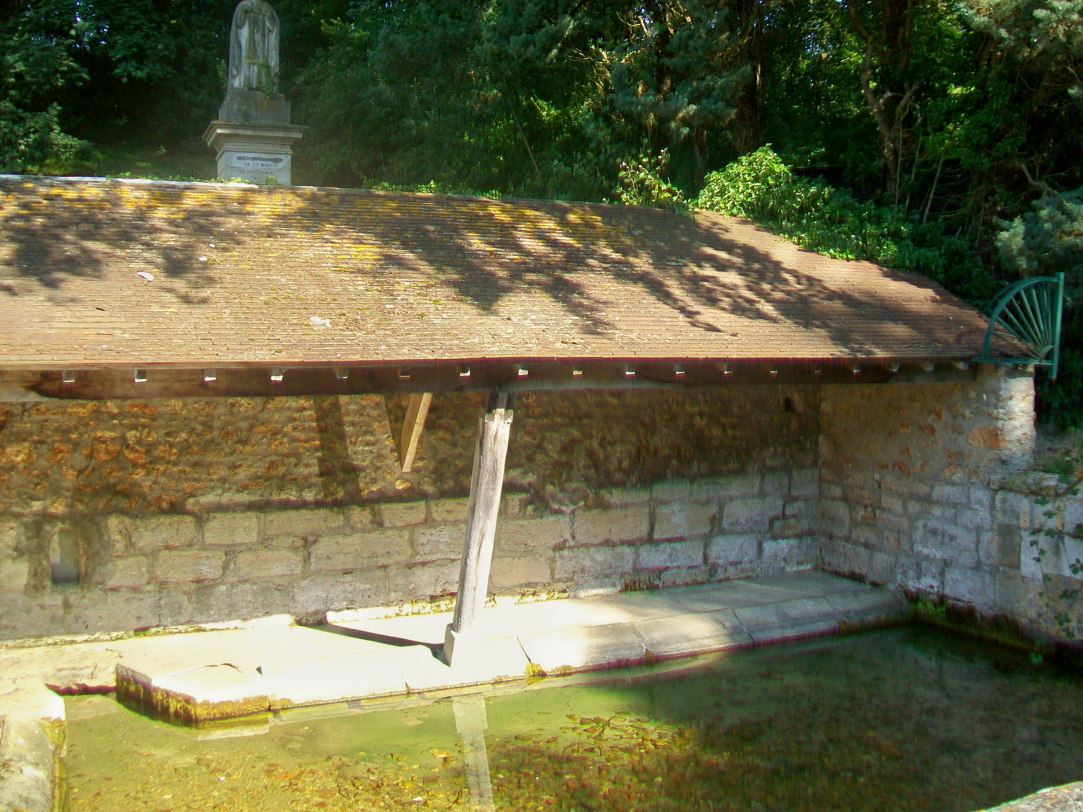 La fontaine Saint-Romain, aménagée en lavoir, accompagnée d'un abreuvoir et surplombée par une statue de Saint-Romain. Près de la RD 159 entre Guiry et Wy.